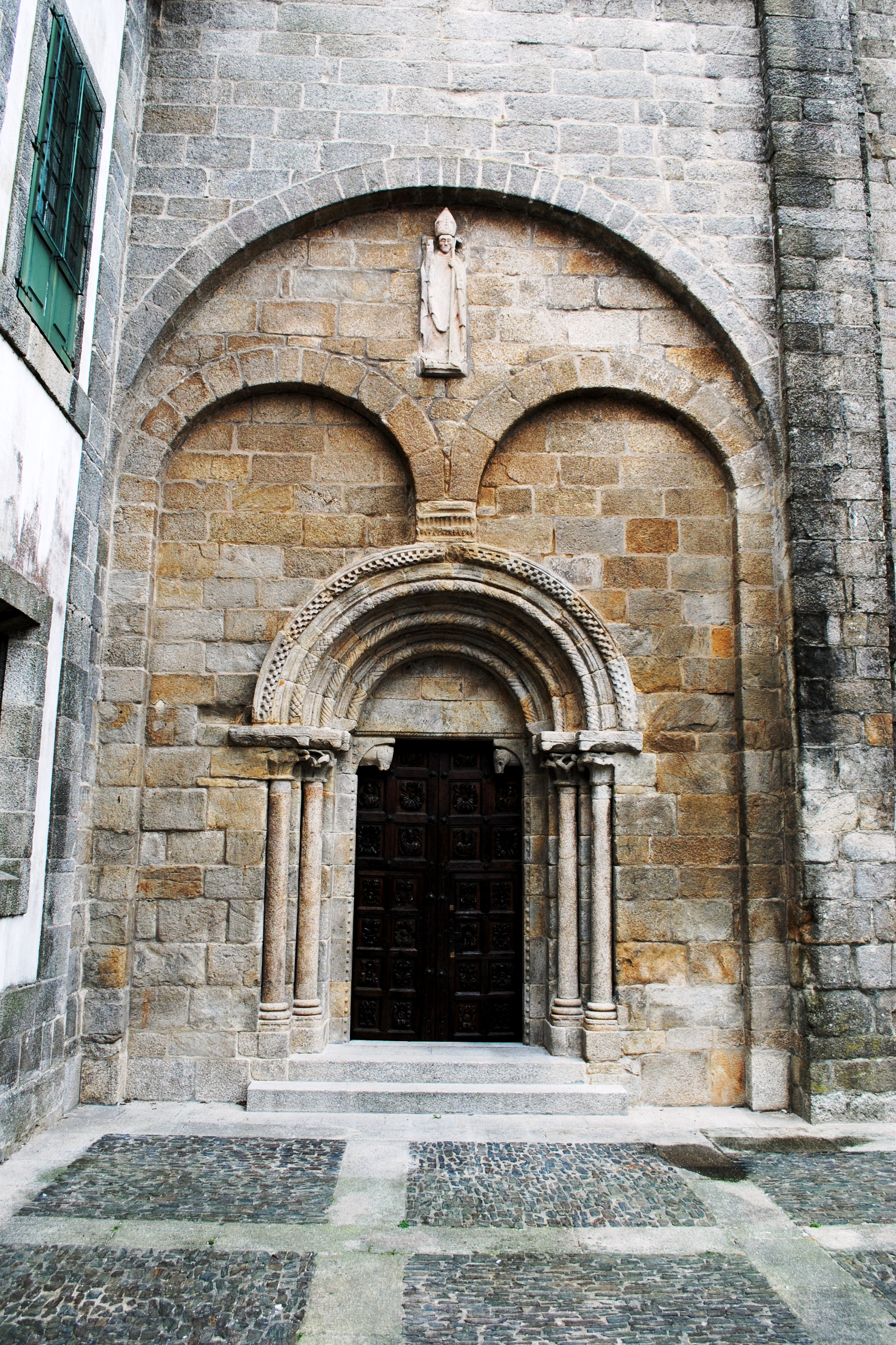 Tui, portada norte, románica, da catedral, coa figura de San Epitacio, primeiro bispo da diocese.